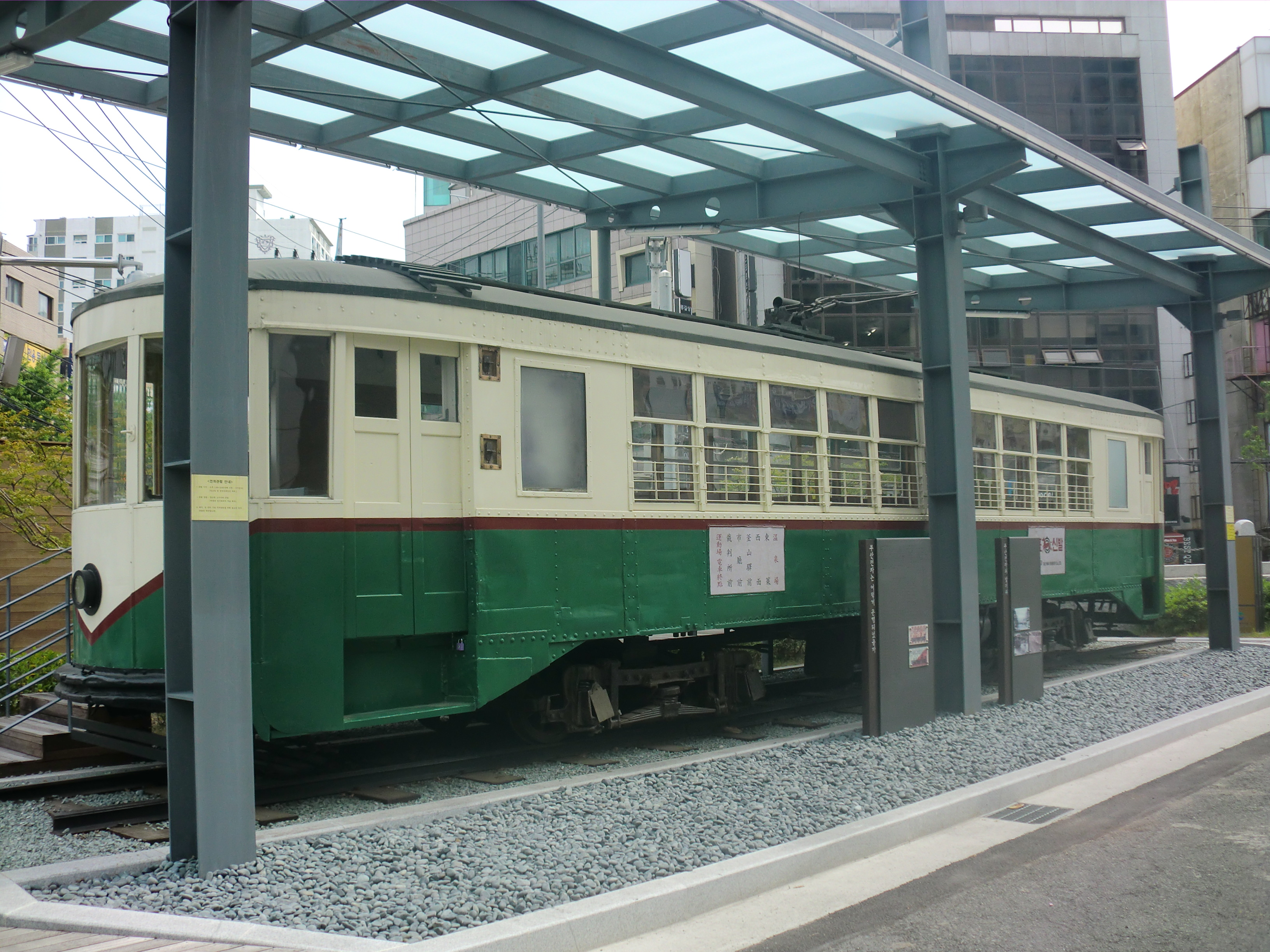 동아대 부민캠퍼스에 전시되어 있는 부산전차